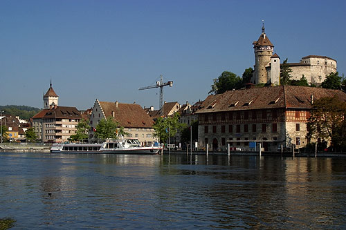 Schaffhausen: Rhein, Güterhof, Schifflände, Munot (Nr. 03.1-5263)